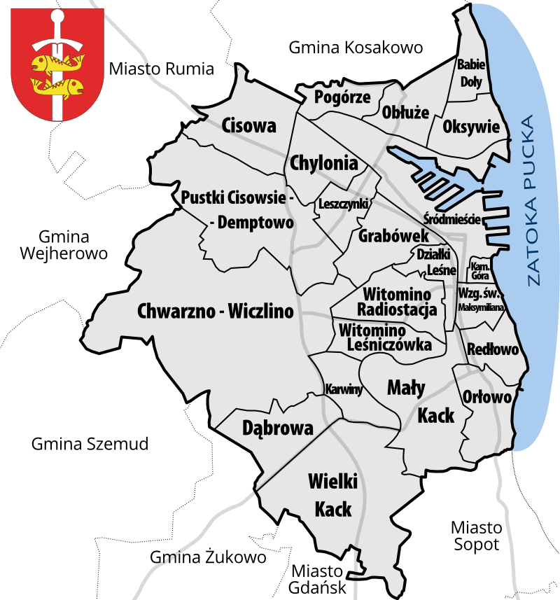 Plan rozmieszczenia 22 dzielnic administracyjnych miasta Gdyni.